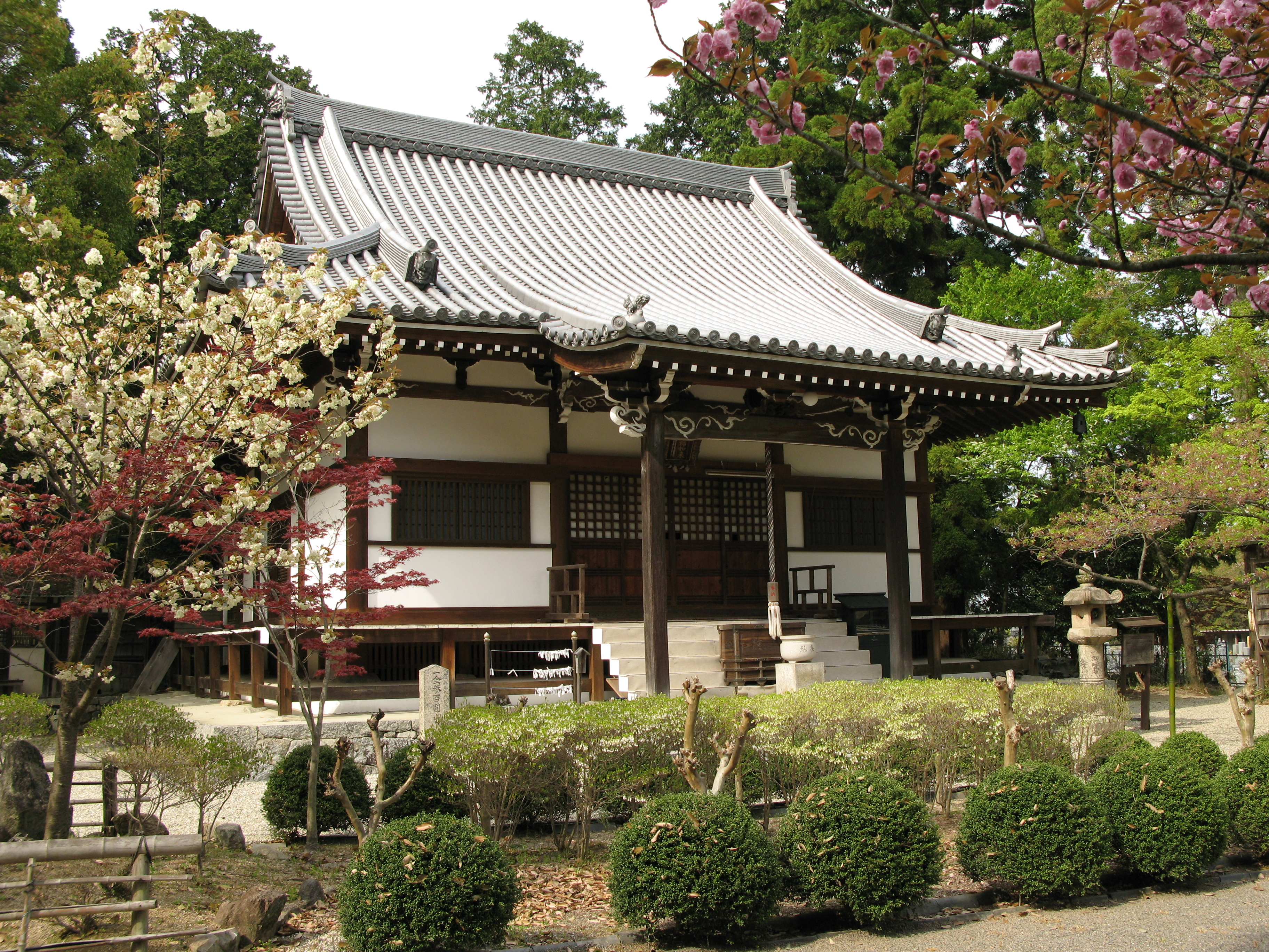 Ryusenji in Tondabayashi, Osaka, Japan